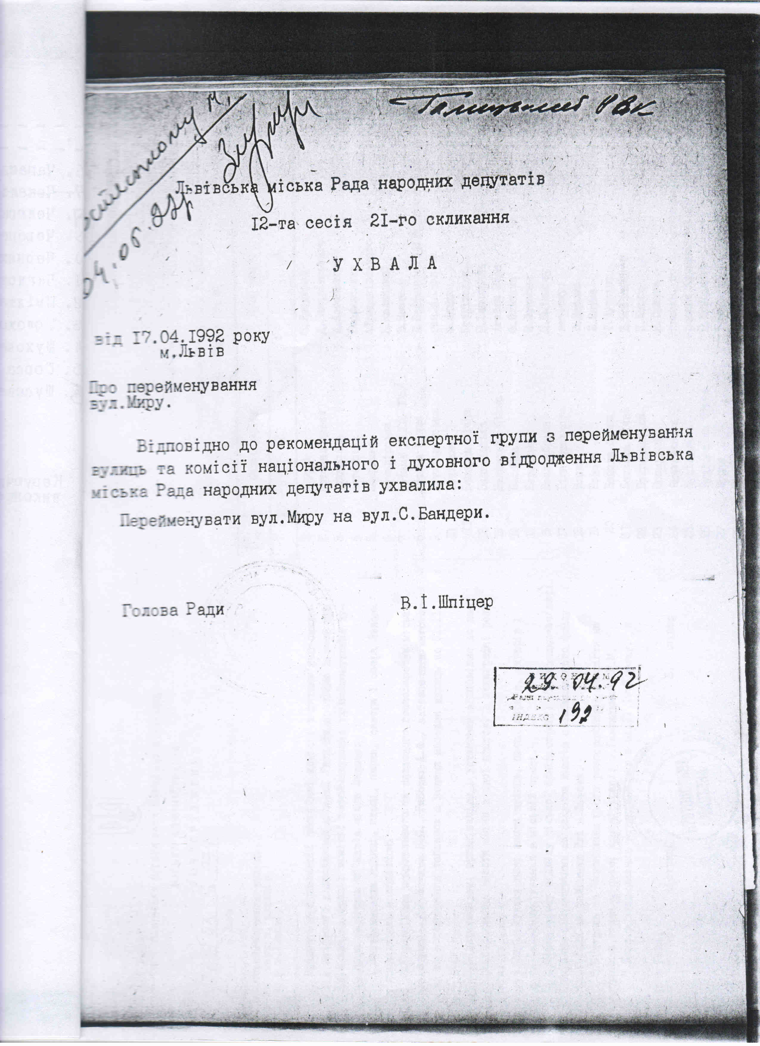 Рішення про перейменування вулиці Бандери